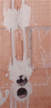 Leerrohr in der Wand verlegt, selbst fotografiert